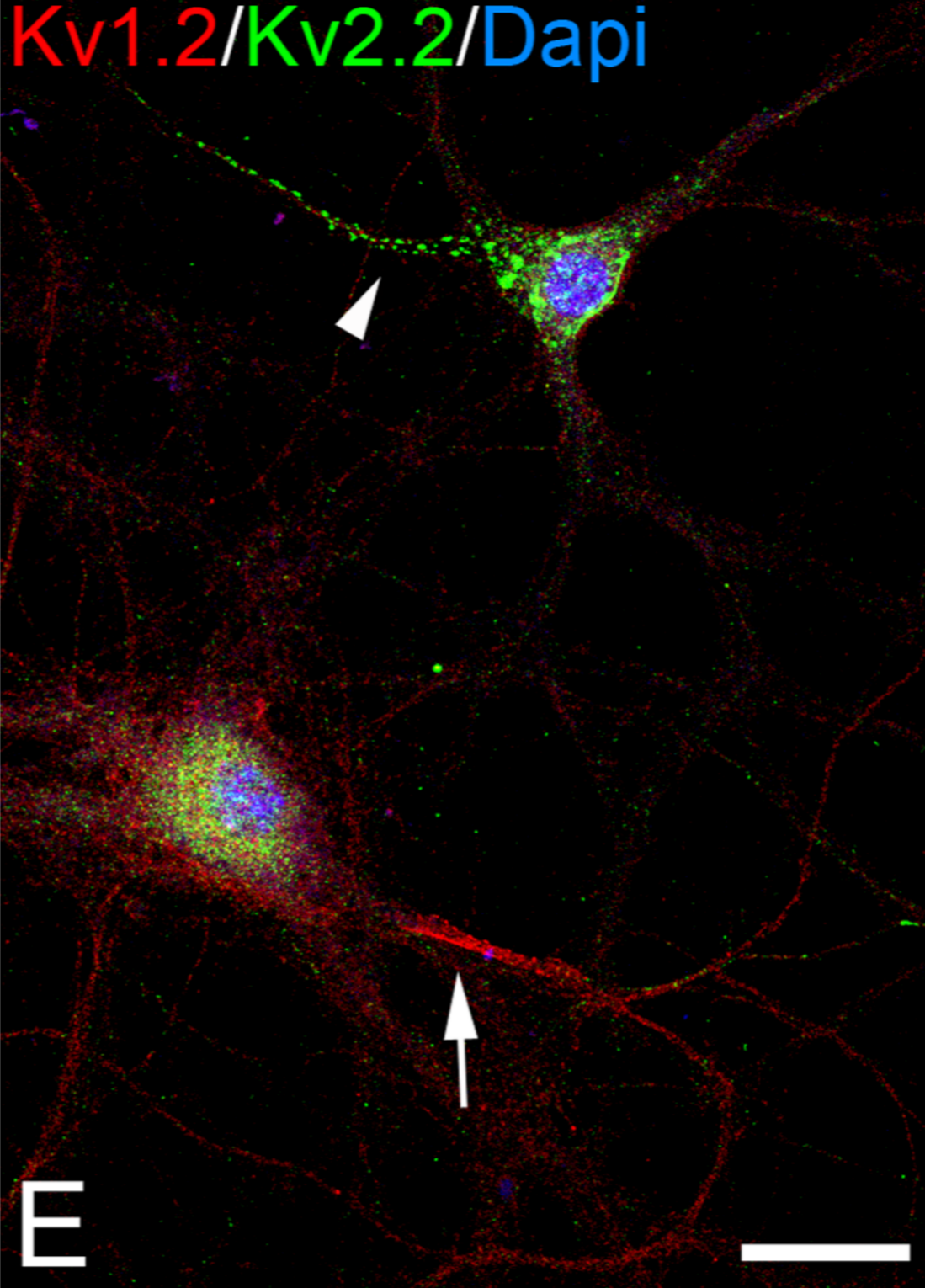 Figura 4.E. Carencia de colocalization de Kv1.2 y Kv2.2 en los AIS (Segmento inicial del axón) de neuronas del hipocampo cultivadas. AIS= Segmento inicial del axón. Los AIS que expresan Kv1.2 en rojo (flecha) carecen de immunotinción de Kv2.2 (punta de flecha) y vice versa. Neuronas del Hipocampo cultivadas. Rata. Inmunohistoquímica. Kv1.2 en rojo. Kv2.2 en verde. ADN (núcleo) en azul. Microscopio Confocal.